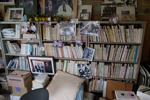 愛知県西尾市にあるガリ本図書館の内部。仮説実験授業研究会の事務局が置かれている。